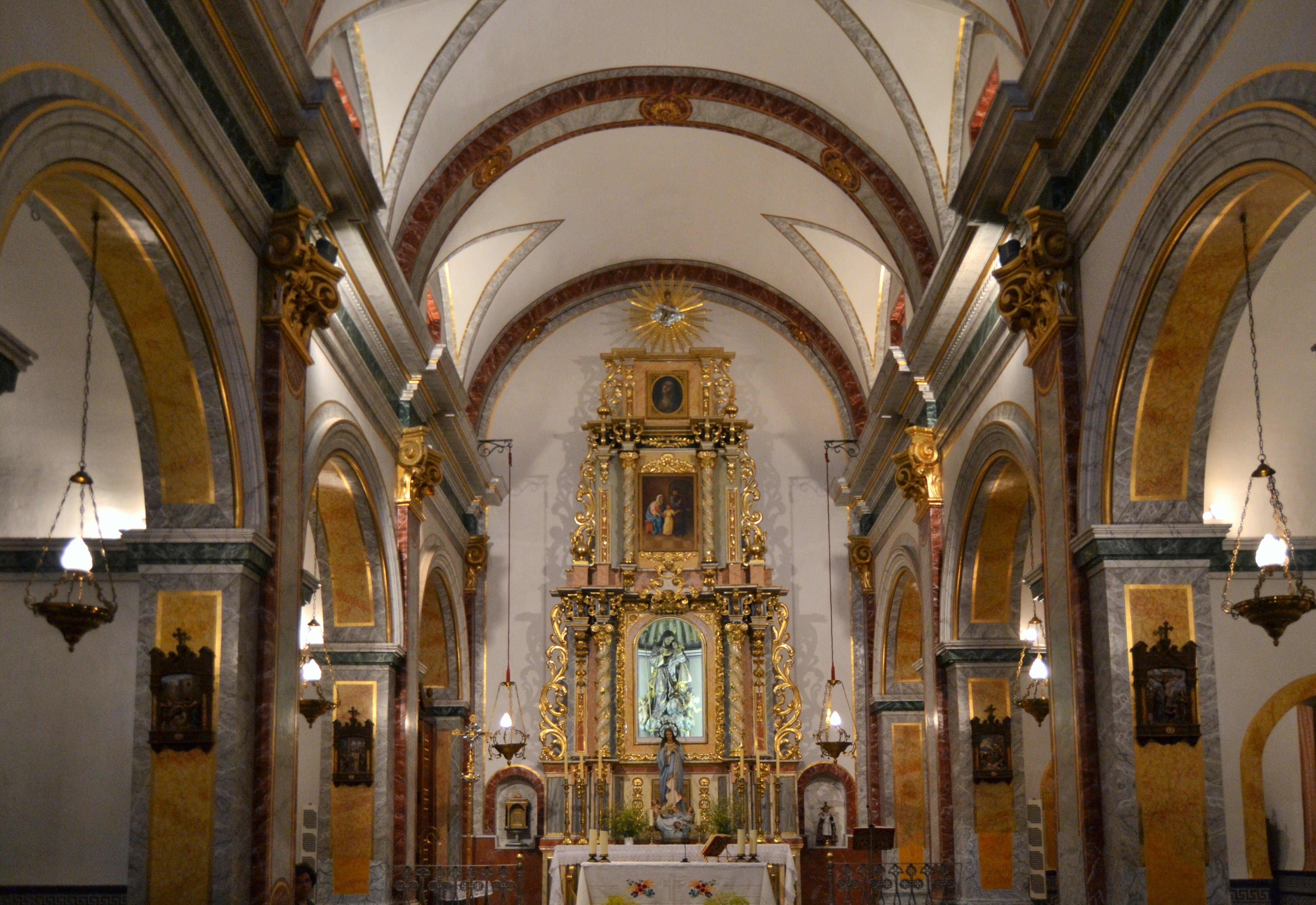 Interior de l'església de sant Josep de Millena. 26.086-004.